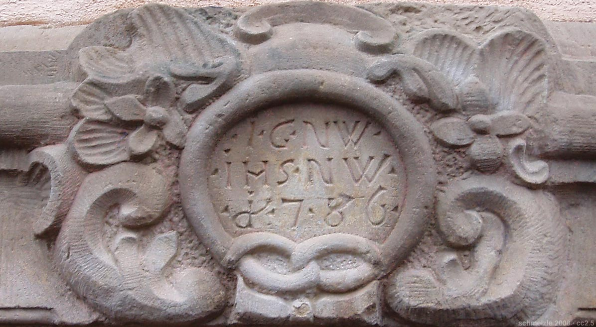 Datierung des Portals am hist. Gasthaus Krone in Bad Rappenau-Bonfeld